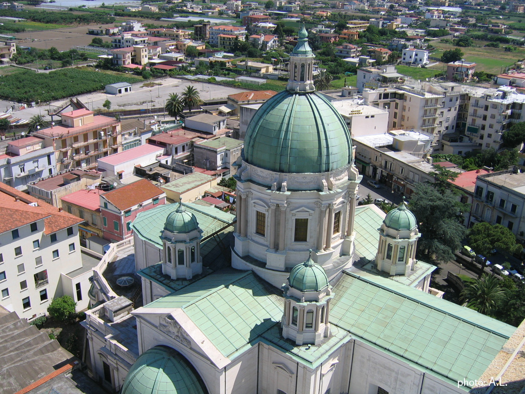 Santuario Pompei